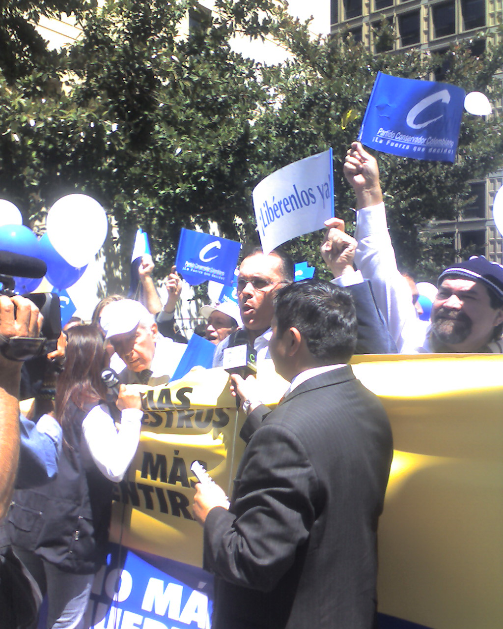 Foto: Germán Cabrejo, especial para equinoXio